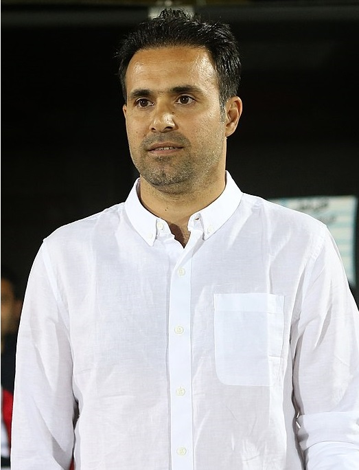 تصاویر برد استقلال مقابل گل ریحان در جام حذفی فوتبال کشور